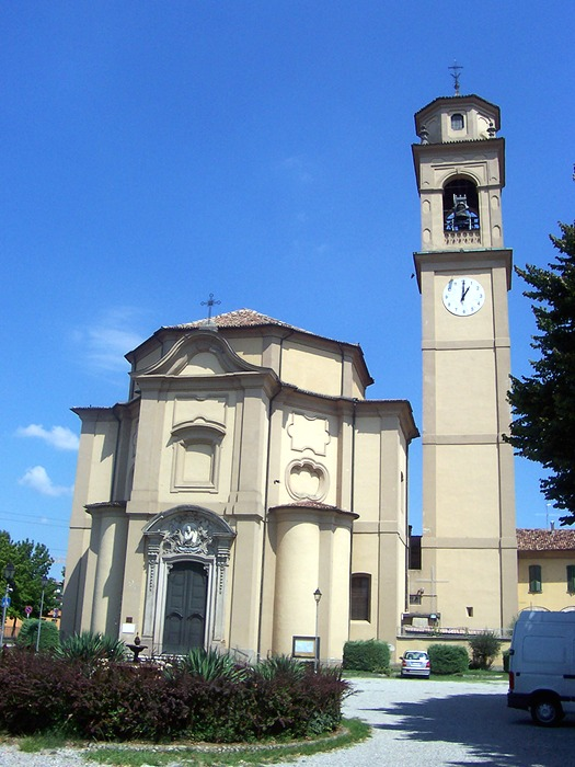 Albignano d'Adda - Chiesa Parrocchiale di S. Majolo